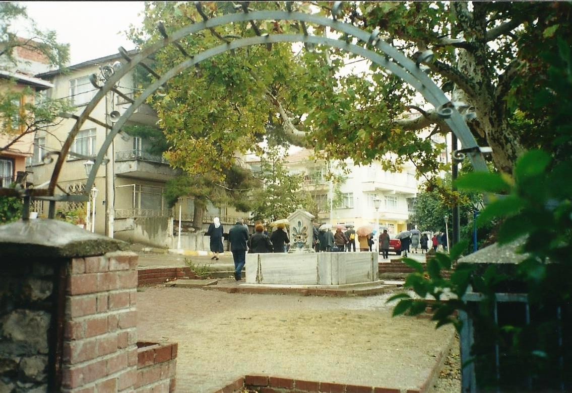 The square as seen from the yard entrance of the old greek elementary school in Celaliye.